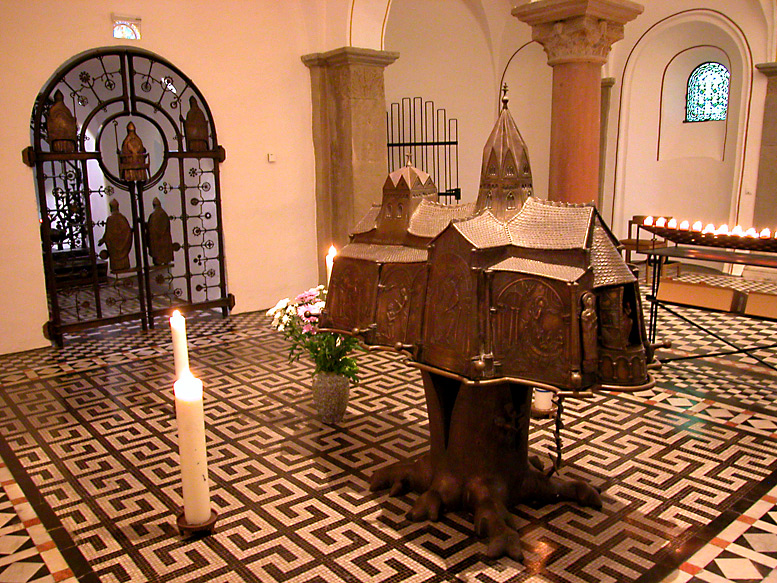 Der Sarkophag mit den Reliquien Hl. Liutger en: Sarcophagus with hallows of St. Liutger